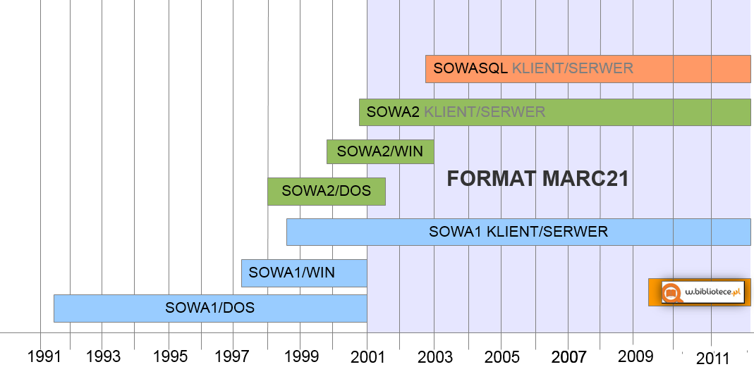 Systemy SOWA - ewolucja